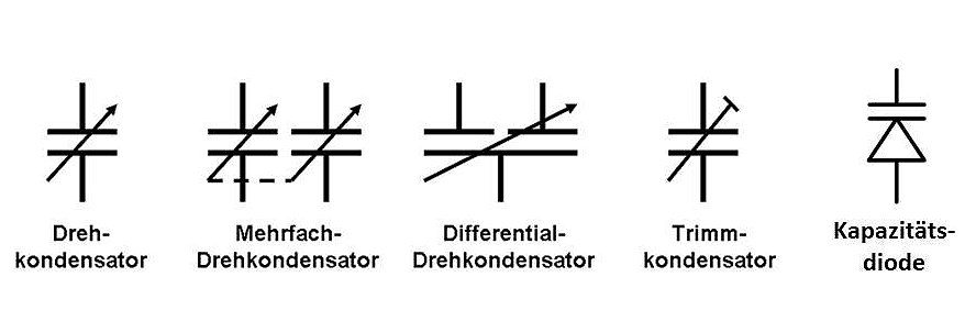 Schaltzeichen von variablen Kondensatoren und Kapazitätsdiode